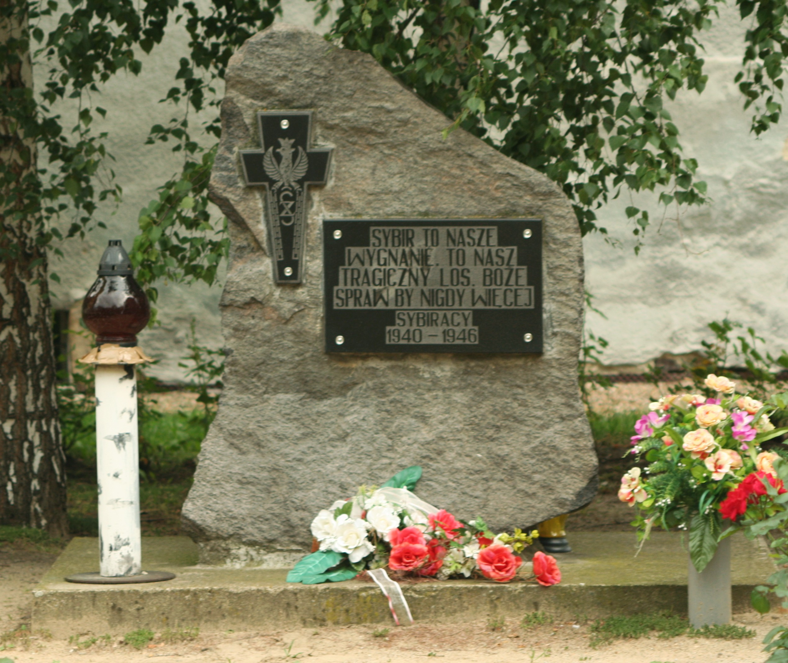 Pomnik Sybiraków w Bolkowie przed kościołem św. Jadwigi